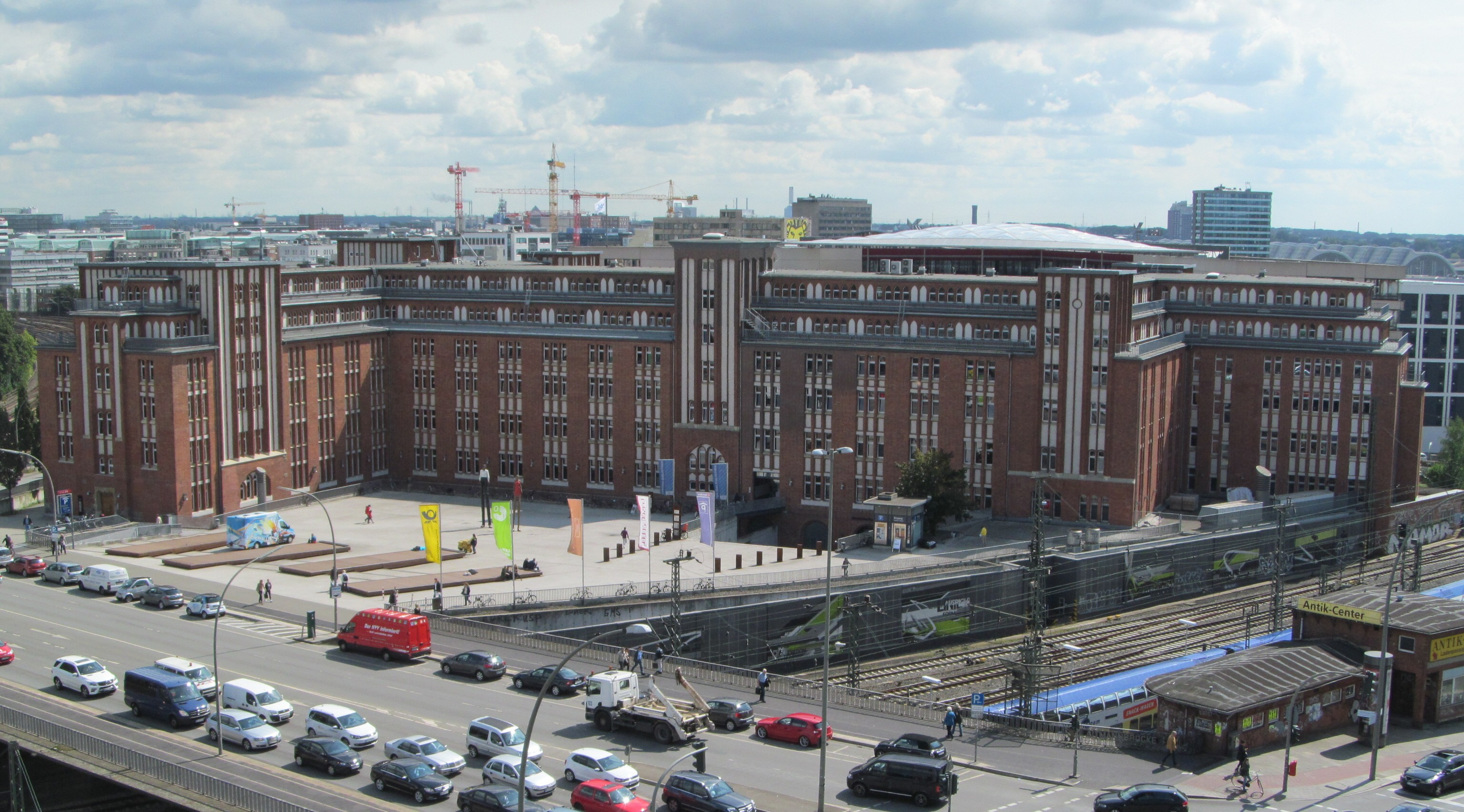 ehemaliges Bahnpostamt Hühnerposten am Hamburger Hauptbahnhof, seit 2004 Zentralbibliothek der Hamburger Öffentlichen Bücherhallen